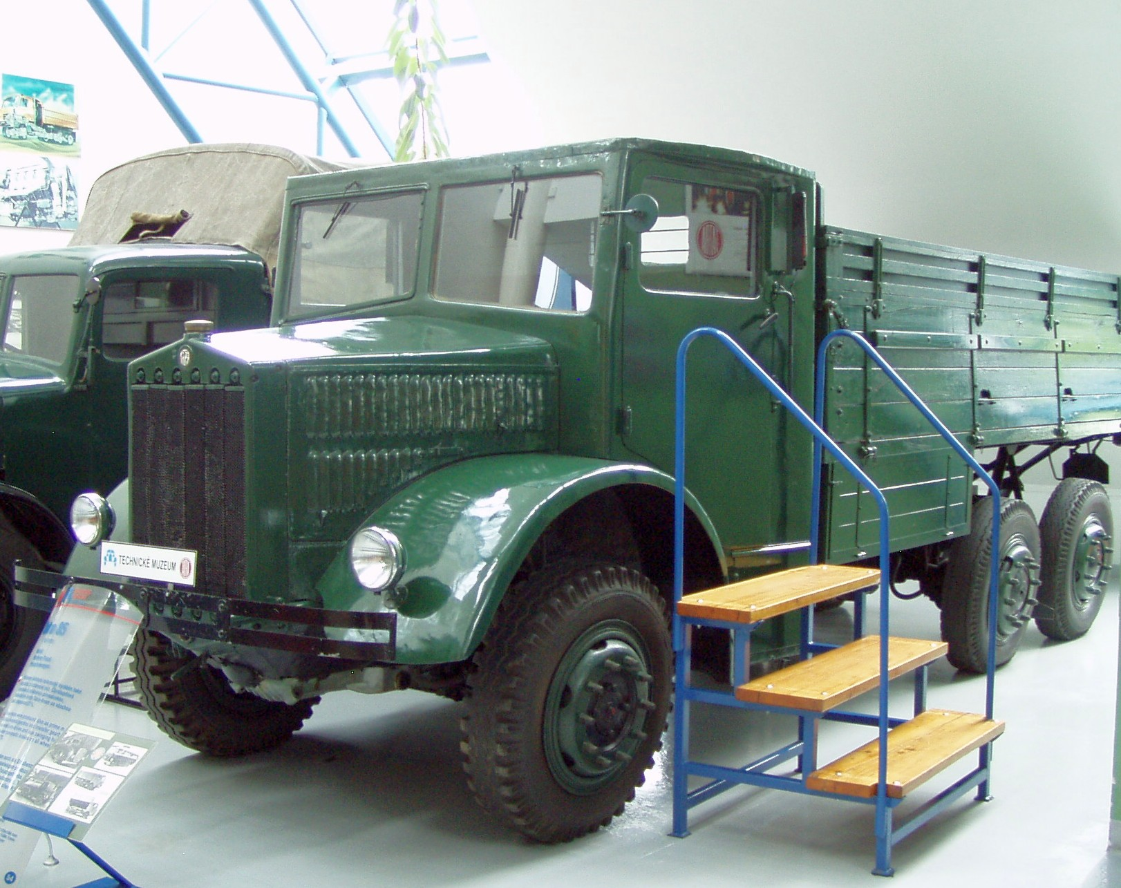 Tatra 85